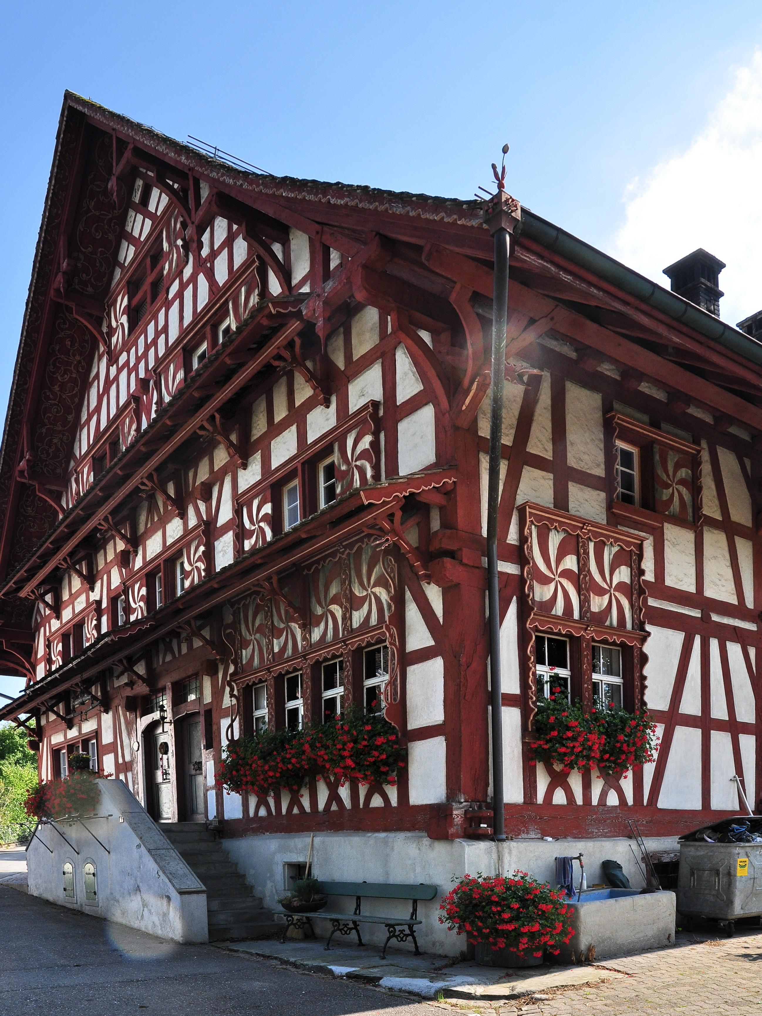 Sogenanntes Eglihaus, Lutikon 1–3 in Hombrechtikon (Switzerland)